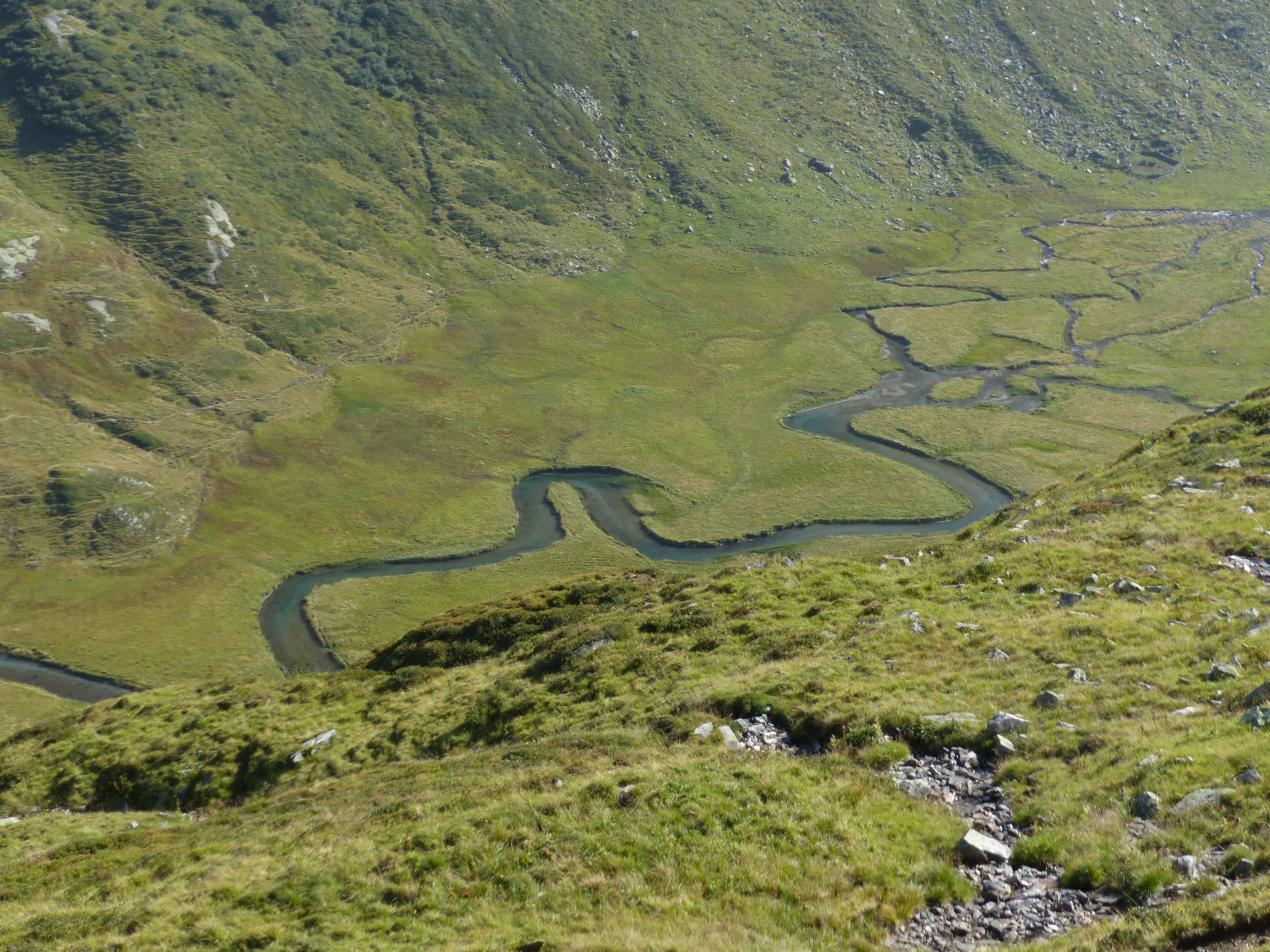 Vordermoos des Hüttenbachs im hinteren Hollersbachtal (beim Aufstieg zur Neuen Fürther Hütte)